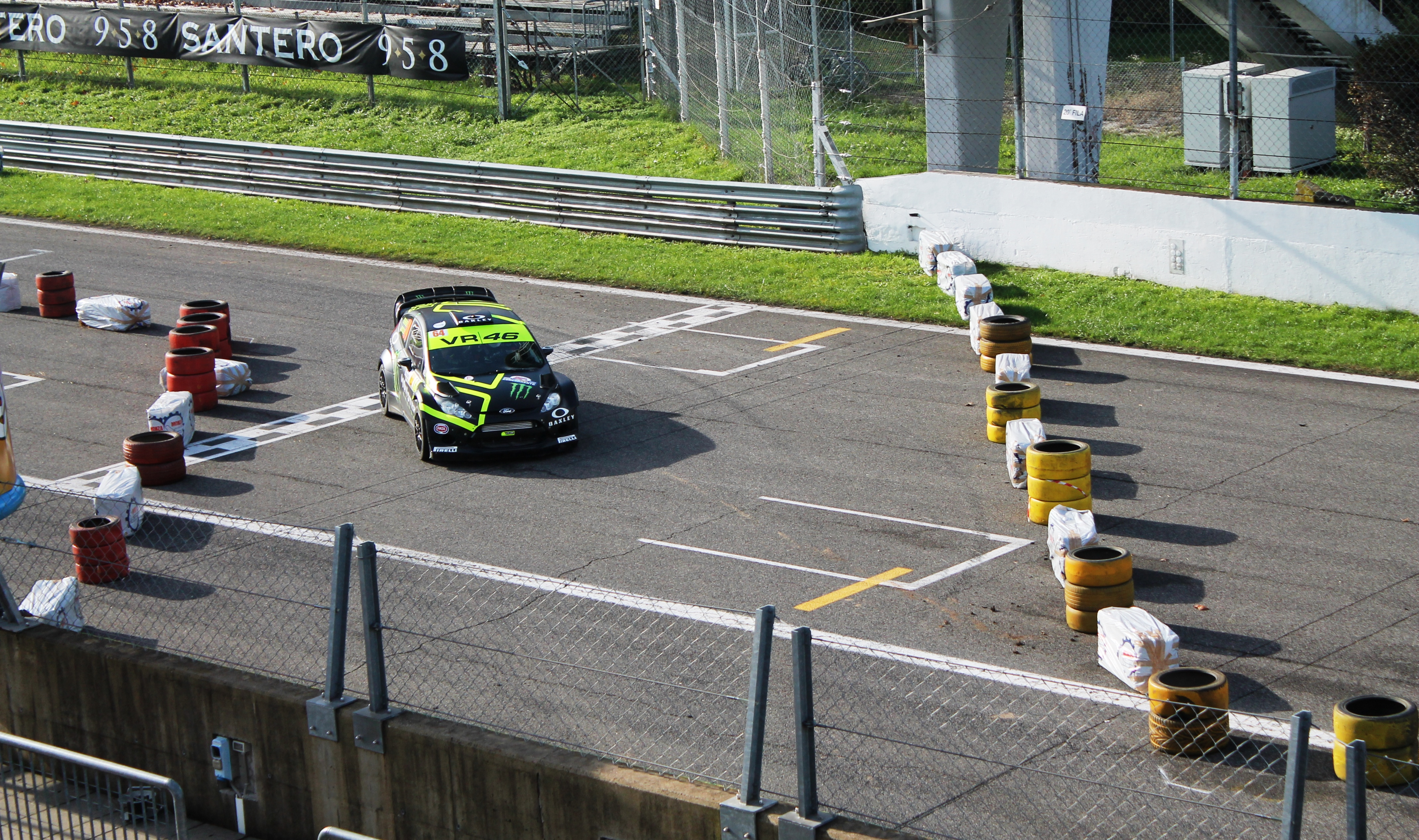 Valentino Rossi in coppia con Cassina al Rally di Monza del 2013 - 2